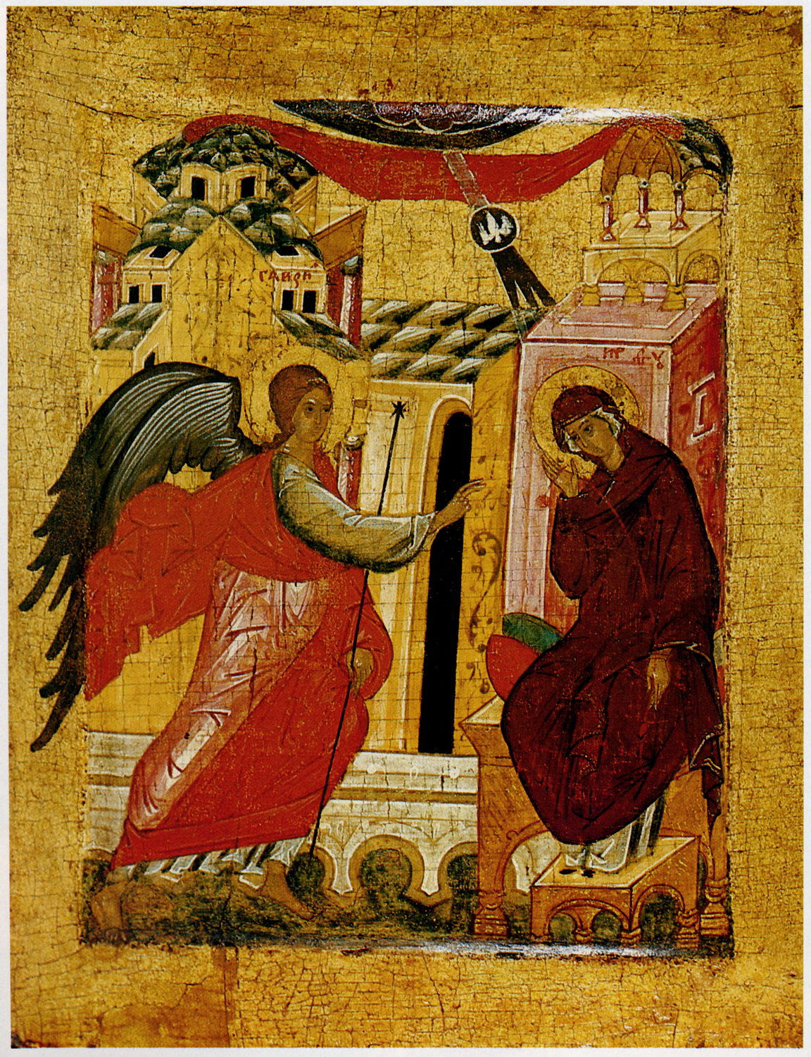 Благовещение. XV век. Музей г. Суздаля. Размер: 29 х 23 см